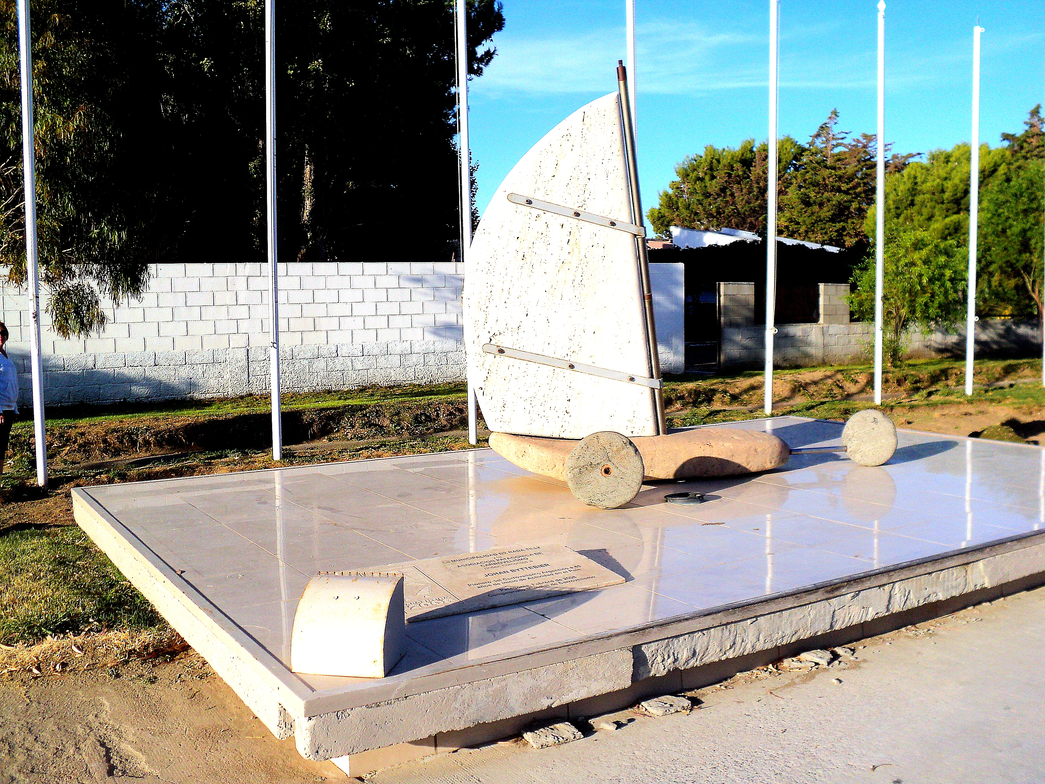 monumento al carrovelismo inaugurado en el mundial 2008 en Rada Tilly